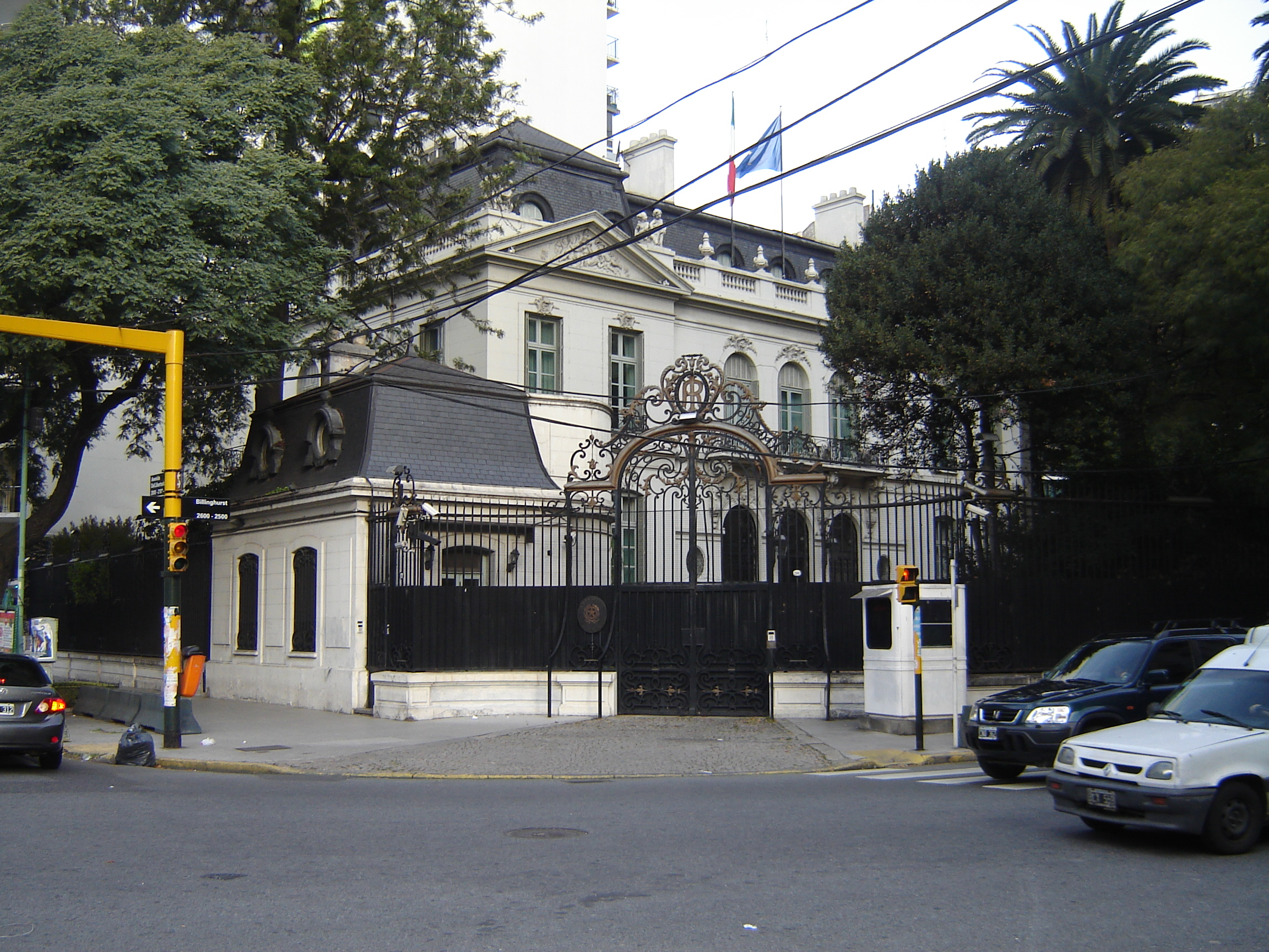 Sector Recoleta embajadas